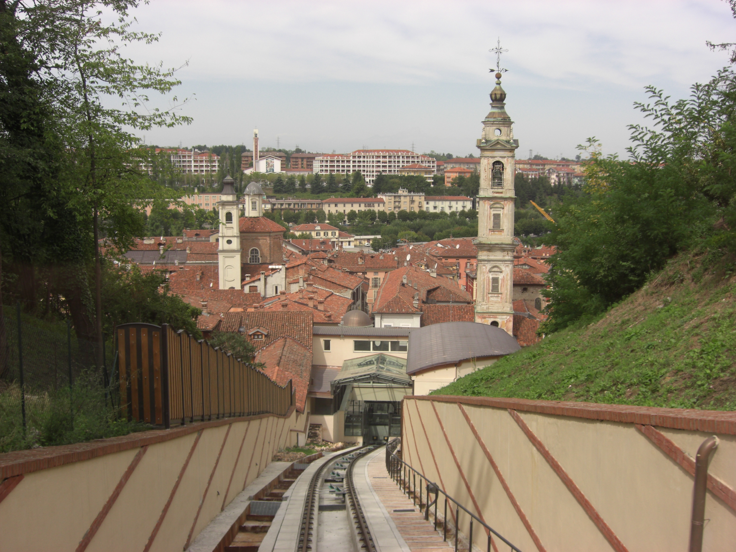 Mondovì - Arrivo nella stazione di Breo tramite funicolare. Sullo Sfondo i tetti del rione Breo